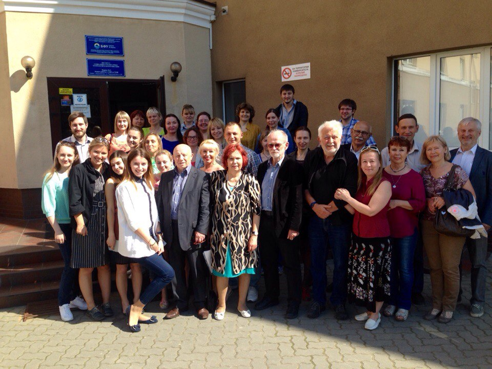 Участник 2-ой Международной конференции русско-немецкой психологии по проблемам психического здоровья. БФУ им. Канта, 2016 год.